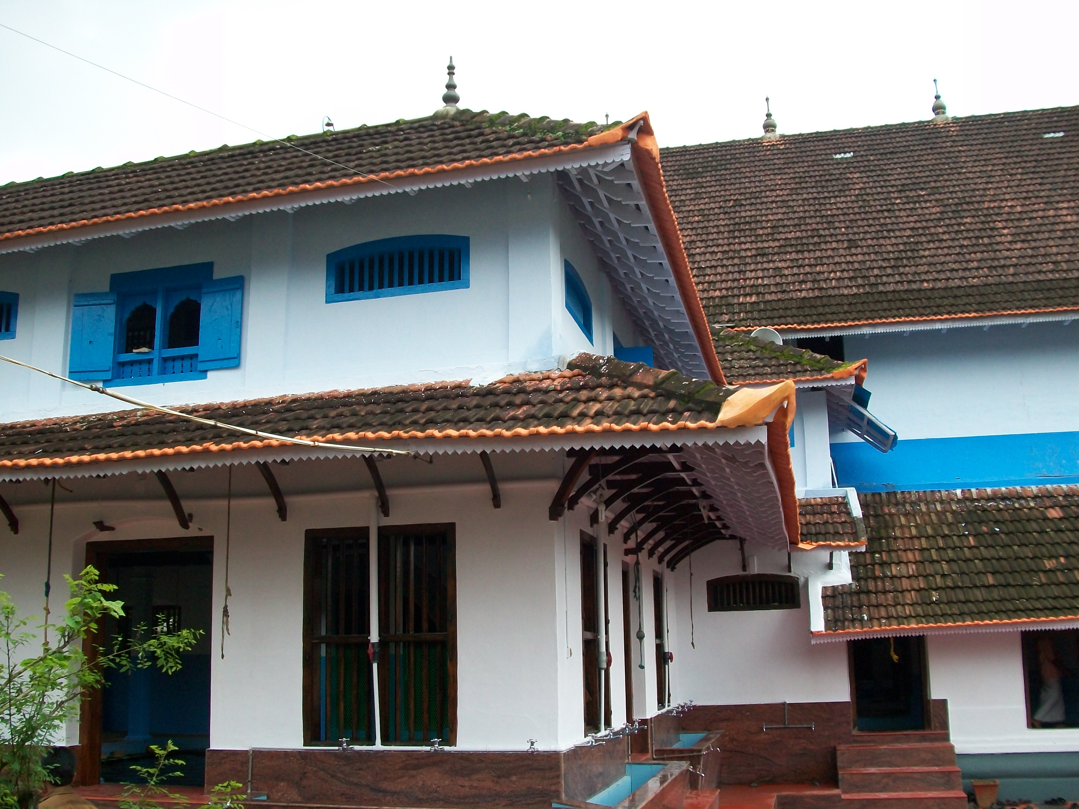 പൊന്നാനി വലിയ ജുമുഅത്ത് പള്ളിയുടെ വടക്ക് ഭാഗത്ത് നിന്നുള്ള ദൃശ്യം